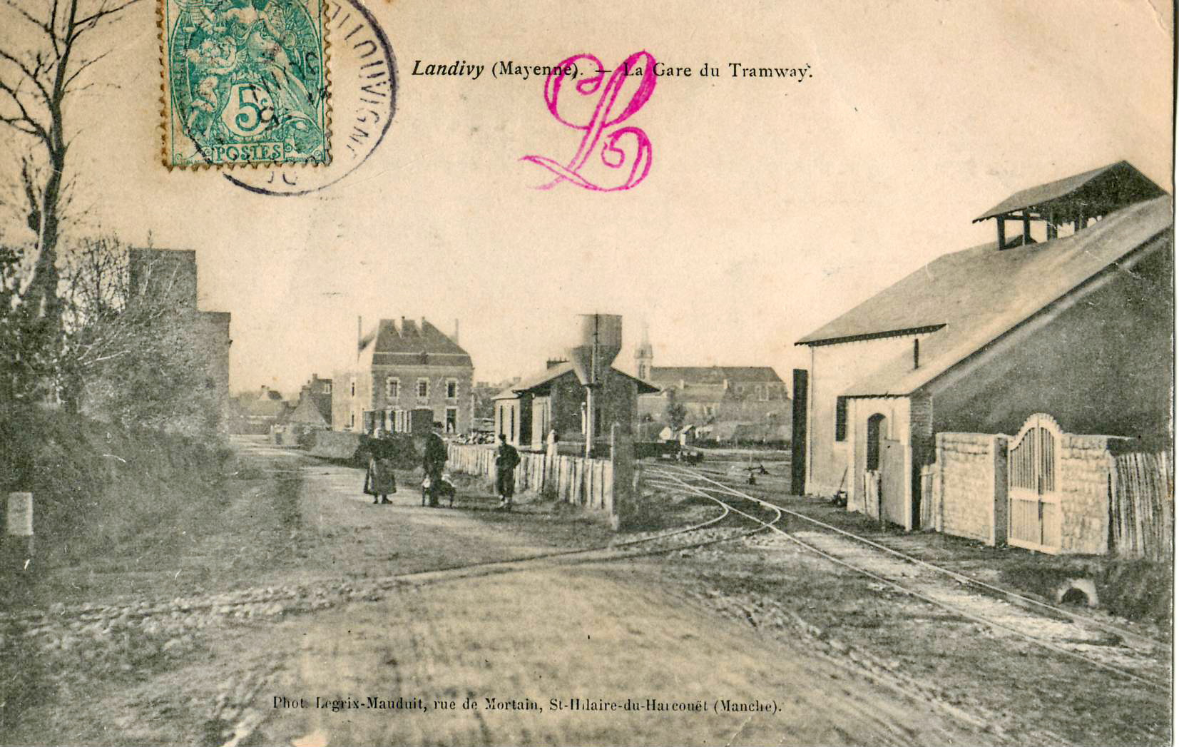 Carte postale ancienne éditée par Legrix-Mauduit, rue de Mortain à Saint-Hilaire du Harcouët : LANDIVY - La Gare du Tramway (Chemins de fer départementaux de la Mayenne)